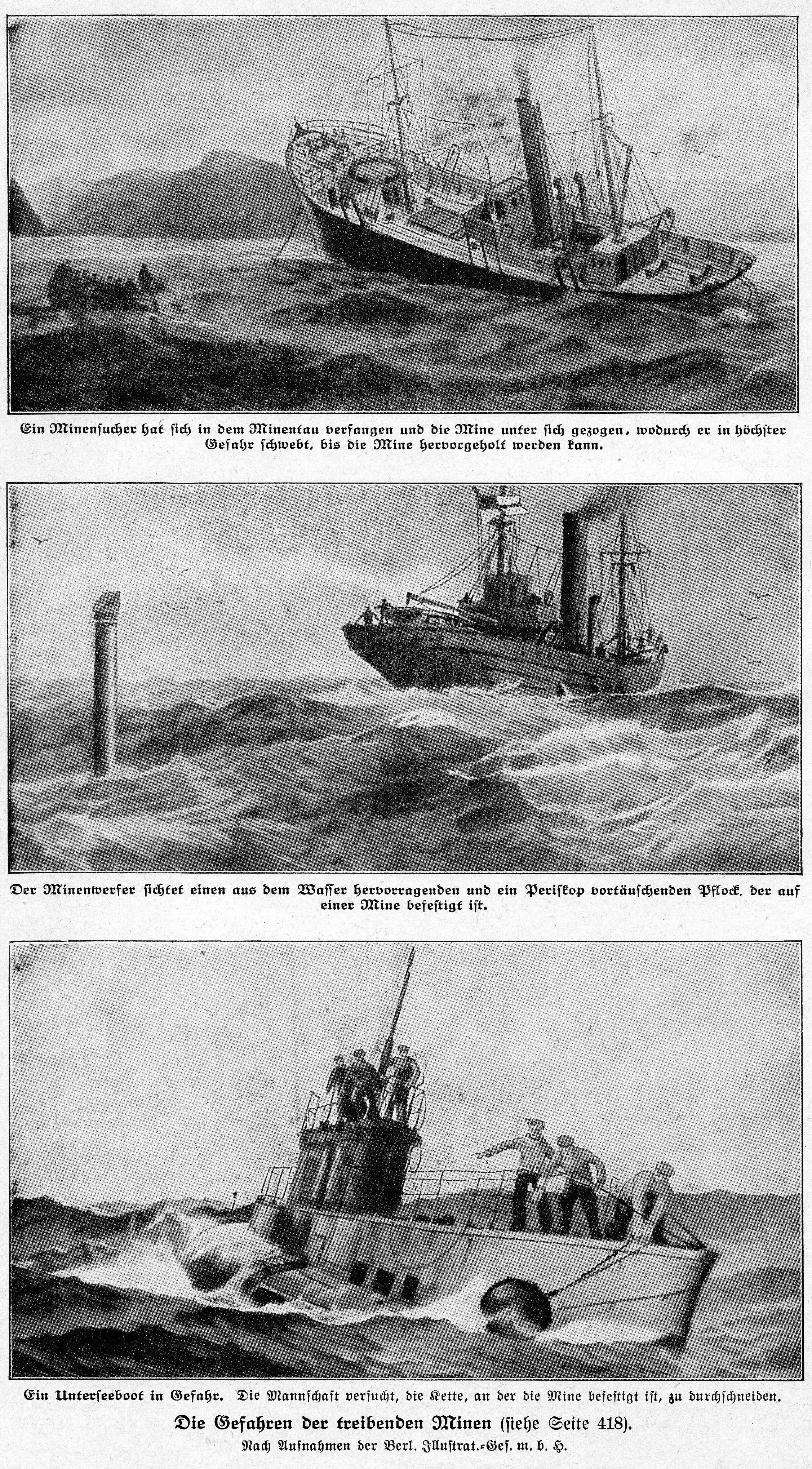 Die Gefahr der treibenden Minen. Illustrirte Zeitung 1916